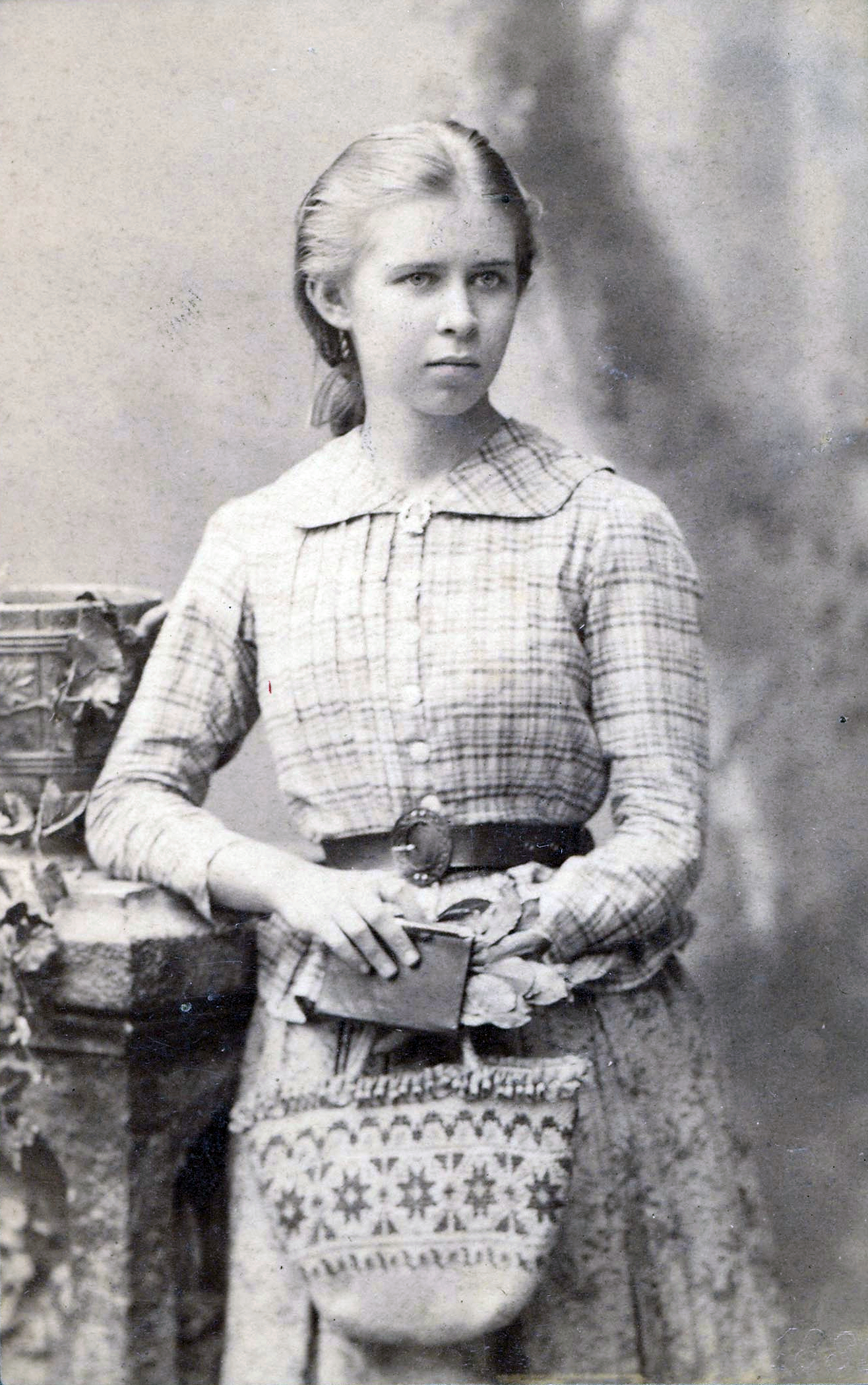 Лариса Петрівна Косач (Леся Українка). Одеса.